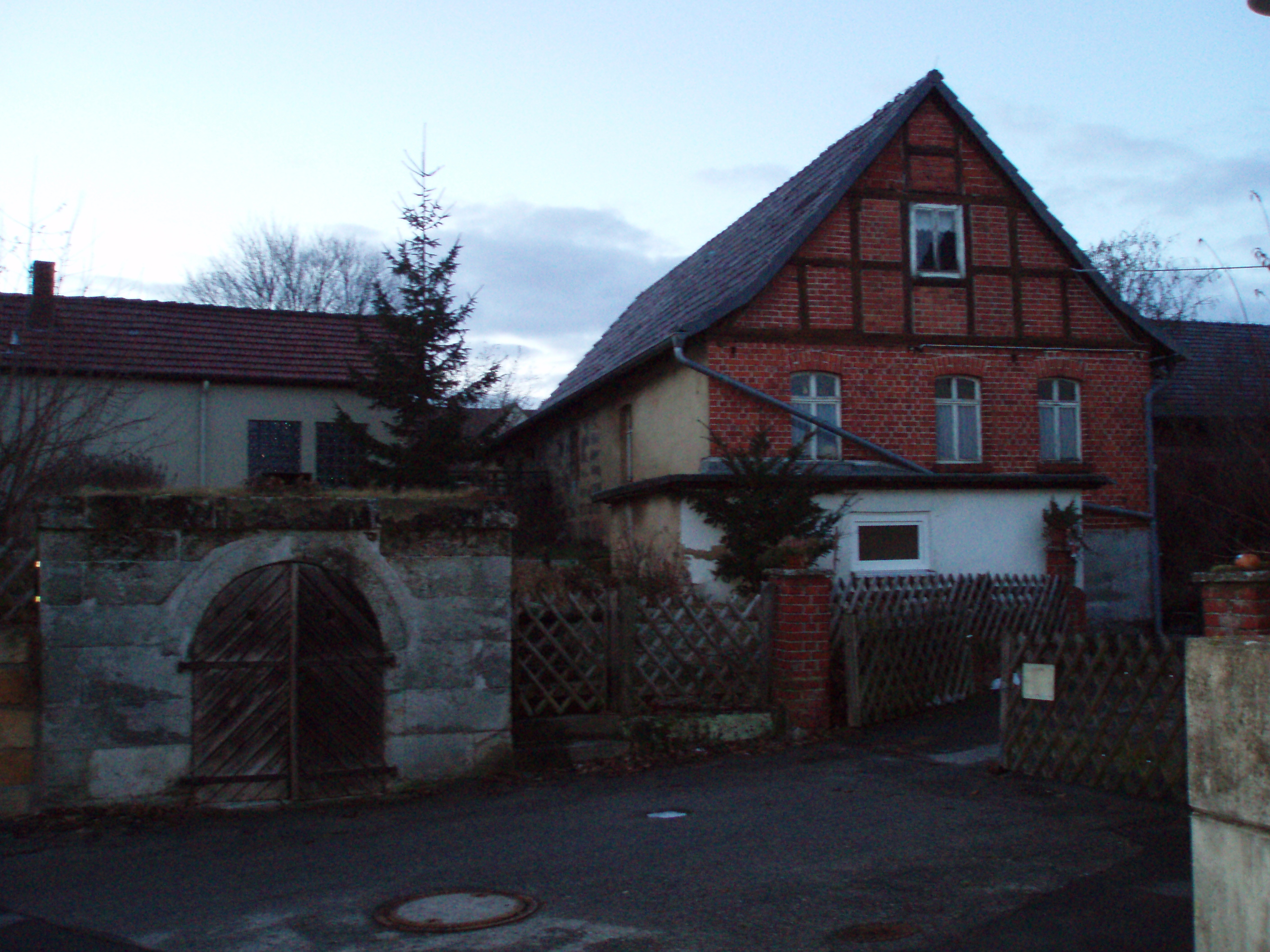 Bertelsdorf (Stadtteil von Coburg), Oberer Mühlenweg 5, Nebengebäude und Kellereingang